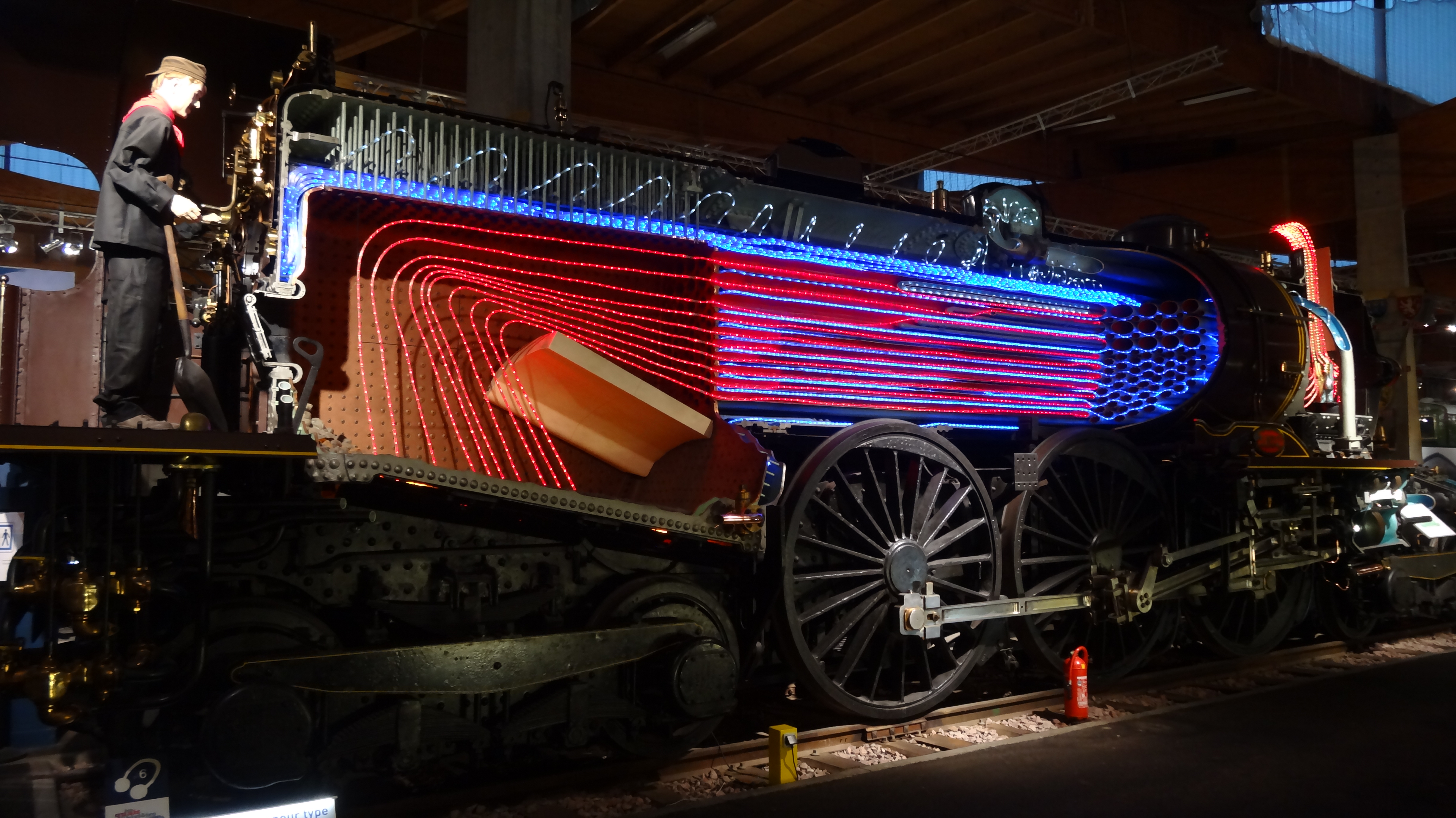 Cite du Train Mulhouse 2014 082